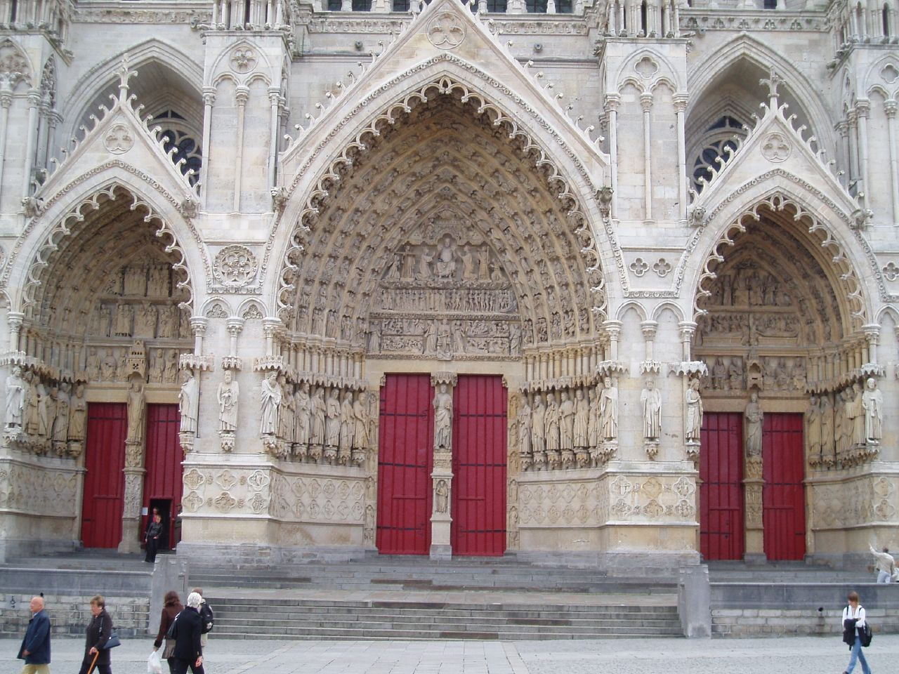 Amiens (Somme, France)